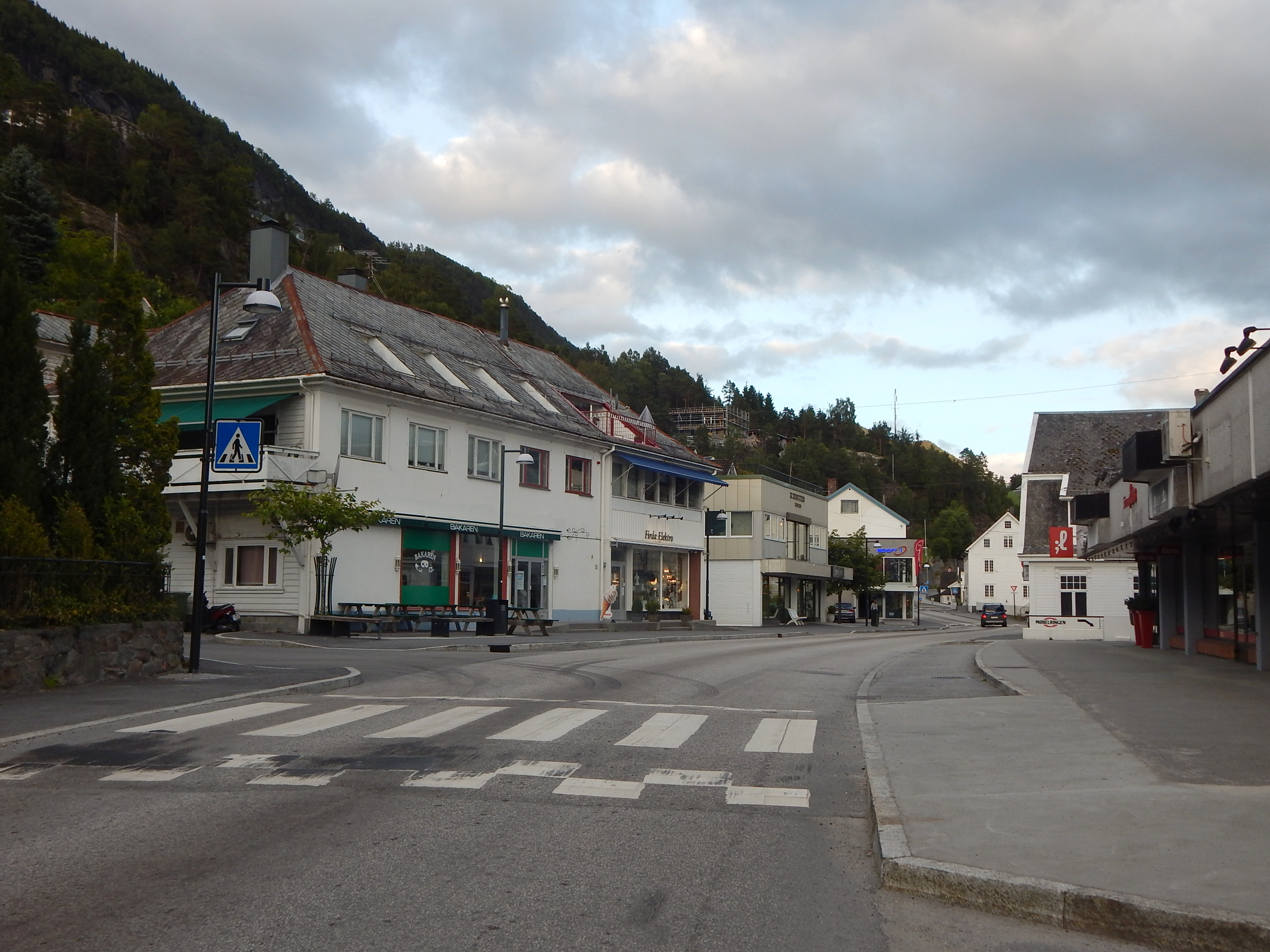 Fylkesvei 700 gjennom Sandane